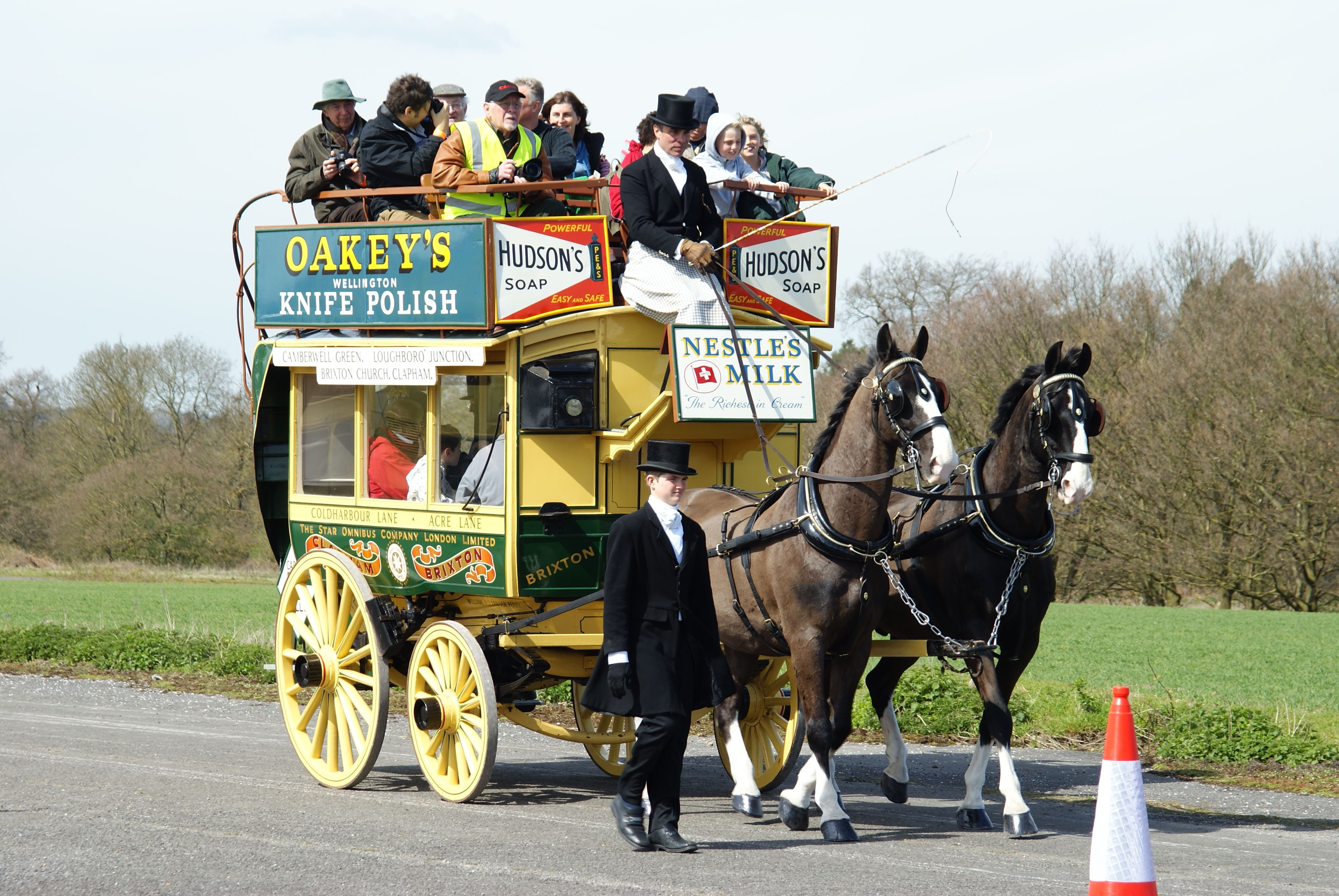 Taken in Ockham, England (map)